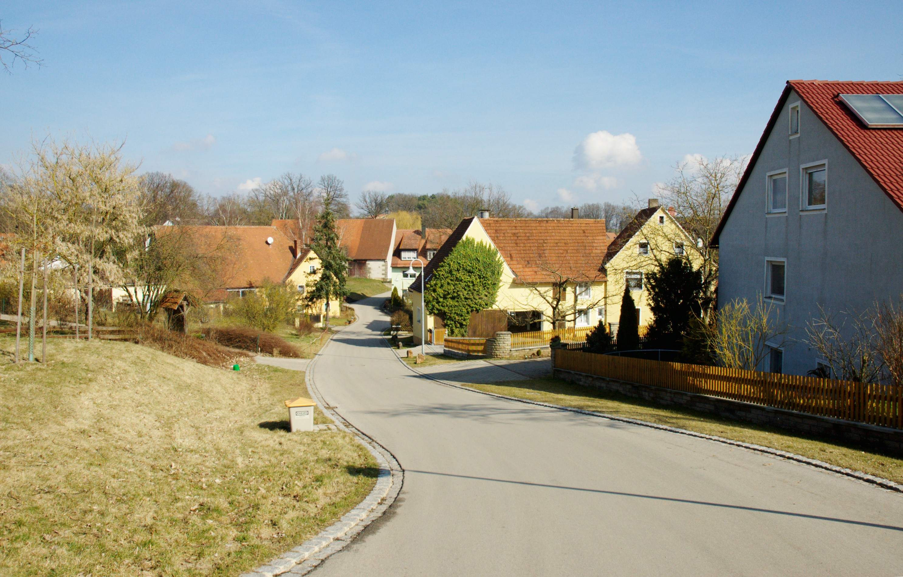 Büschelbach